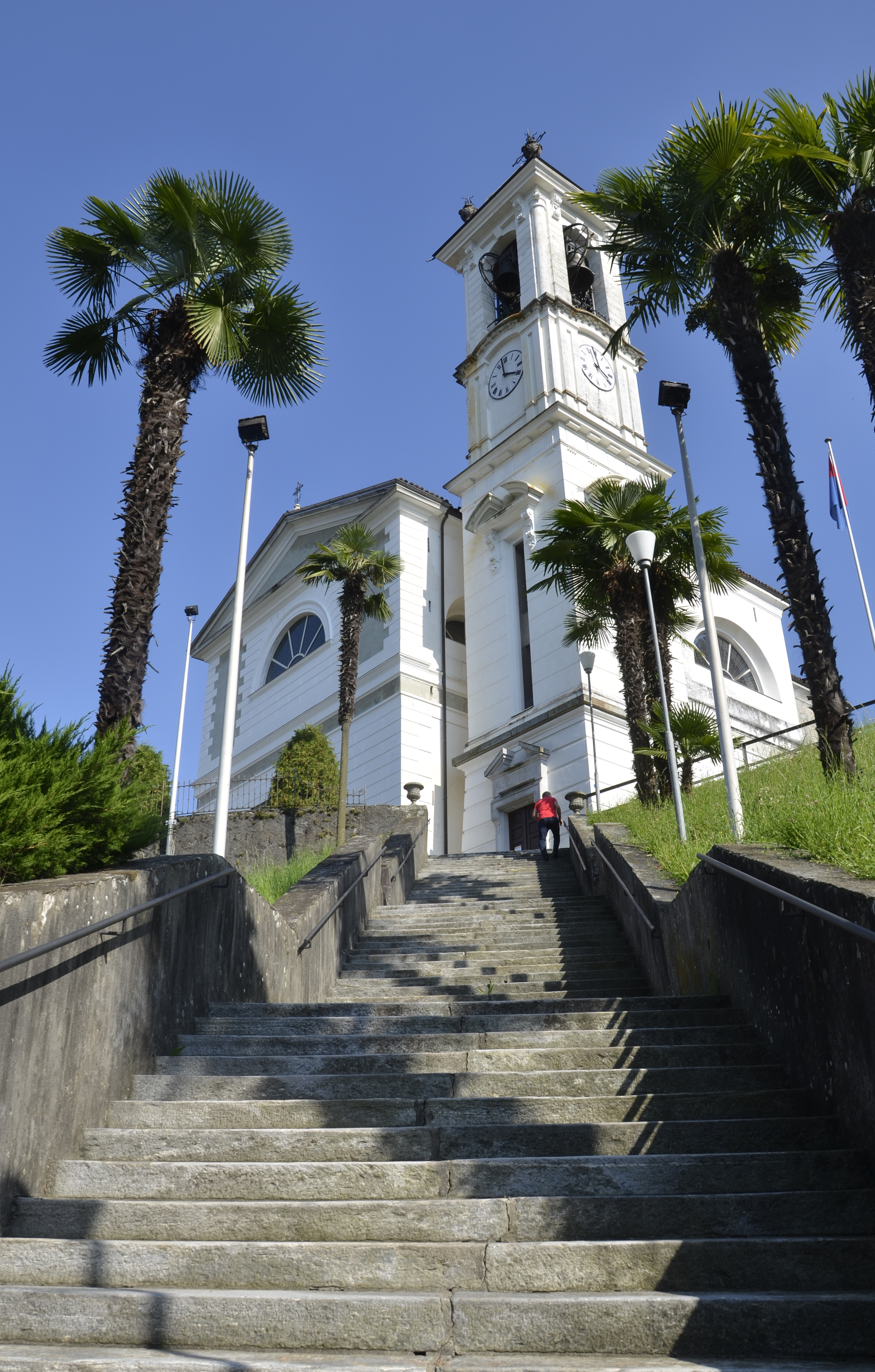 Complesso di San Carlo: chiesa e casa parrocchiale